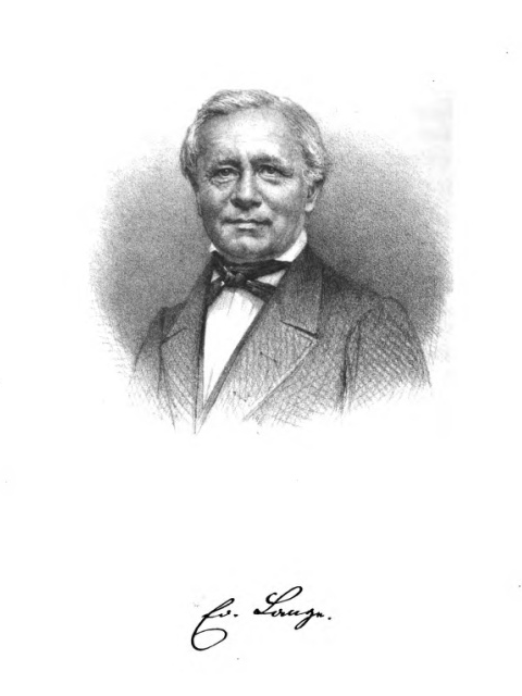 Eduard Lange, Porträt mit Signatur